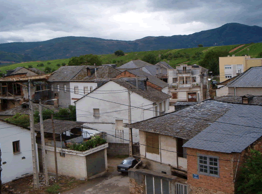 Vista de la calle 3, Valtuille de Abajo, León (España)